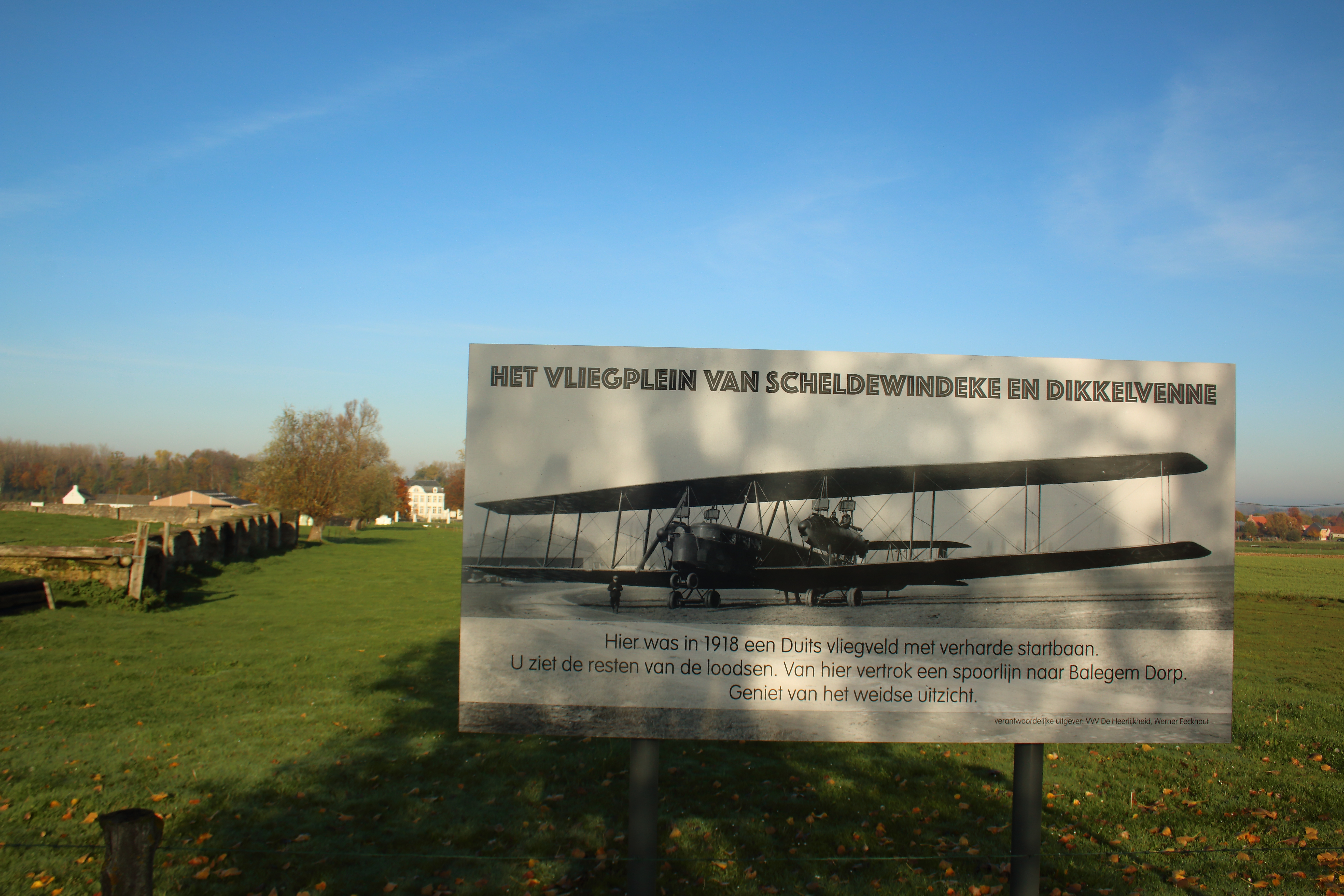 vliegveld Eerste Wereldoorlog, Lange Munte, Scheldewindeke, Oosterzele, Vlaanderen, België